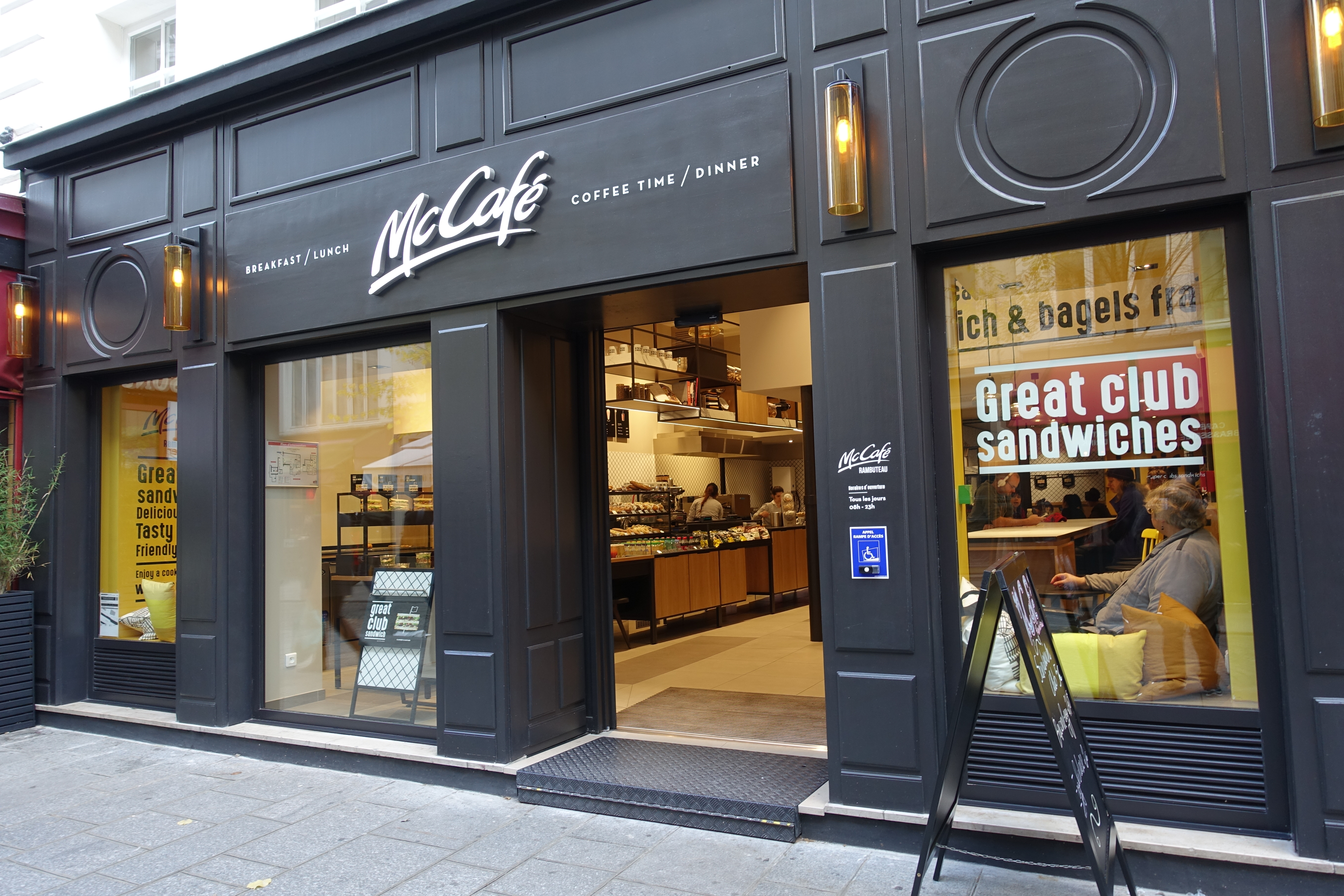 McCafé @ Paris